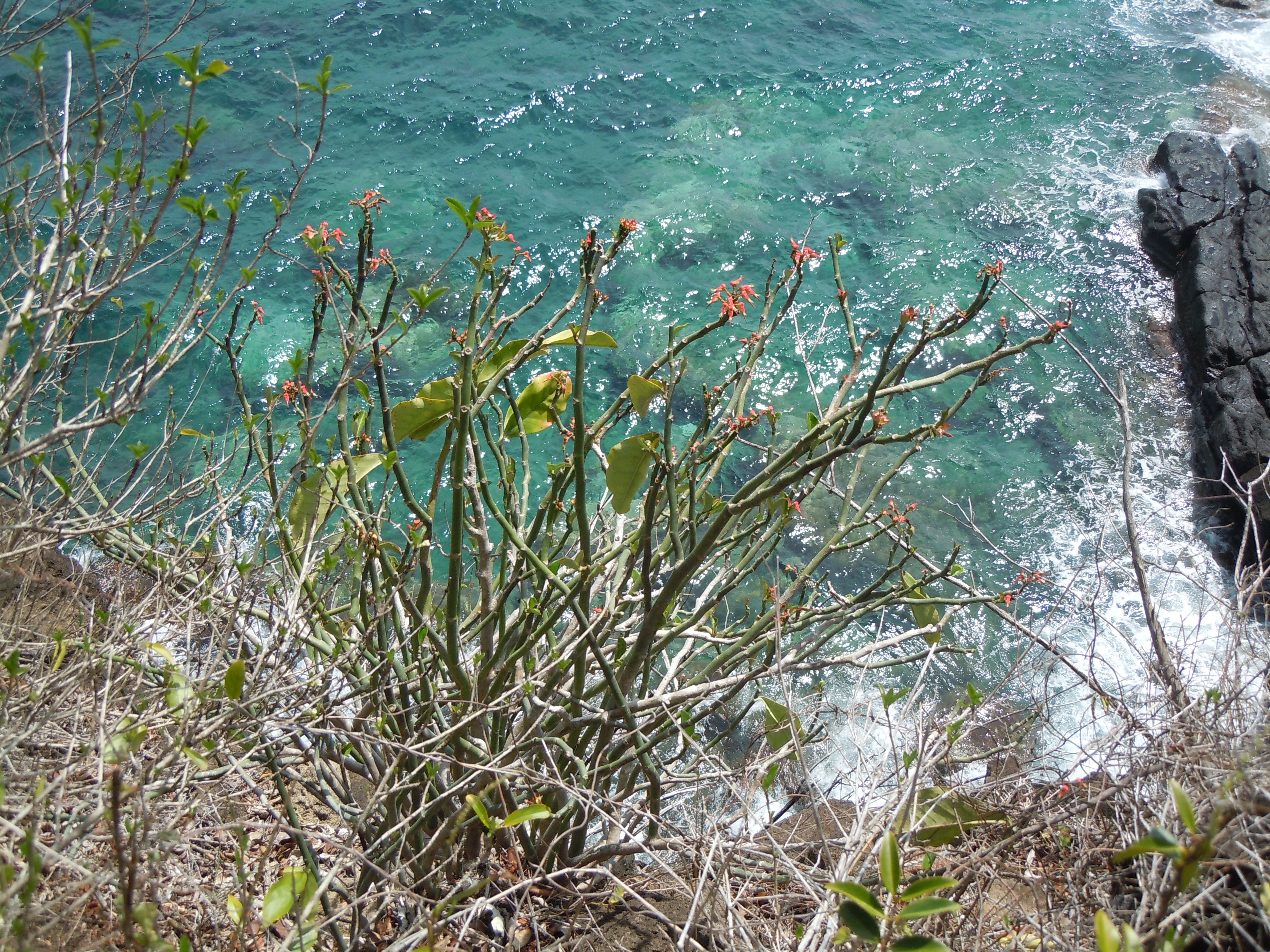 Pedilanthus tithymaloides - La Guadeloupe - Forêt de Malendure à Anse Colas